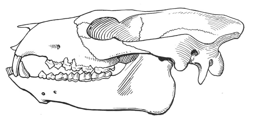 Agriochoerus latifrons skull